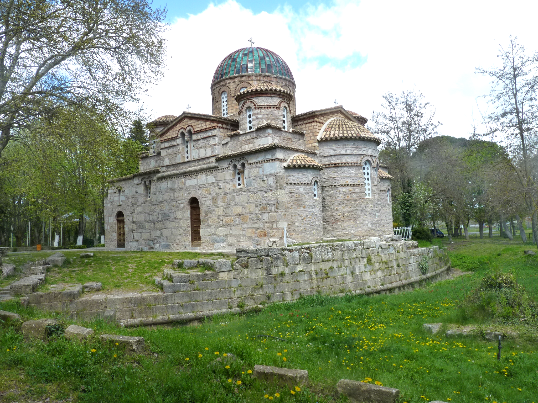 Επισκοπή Τεγέας